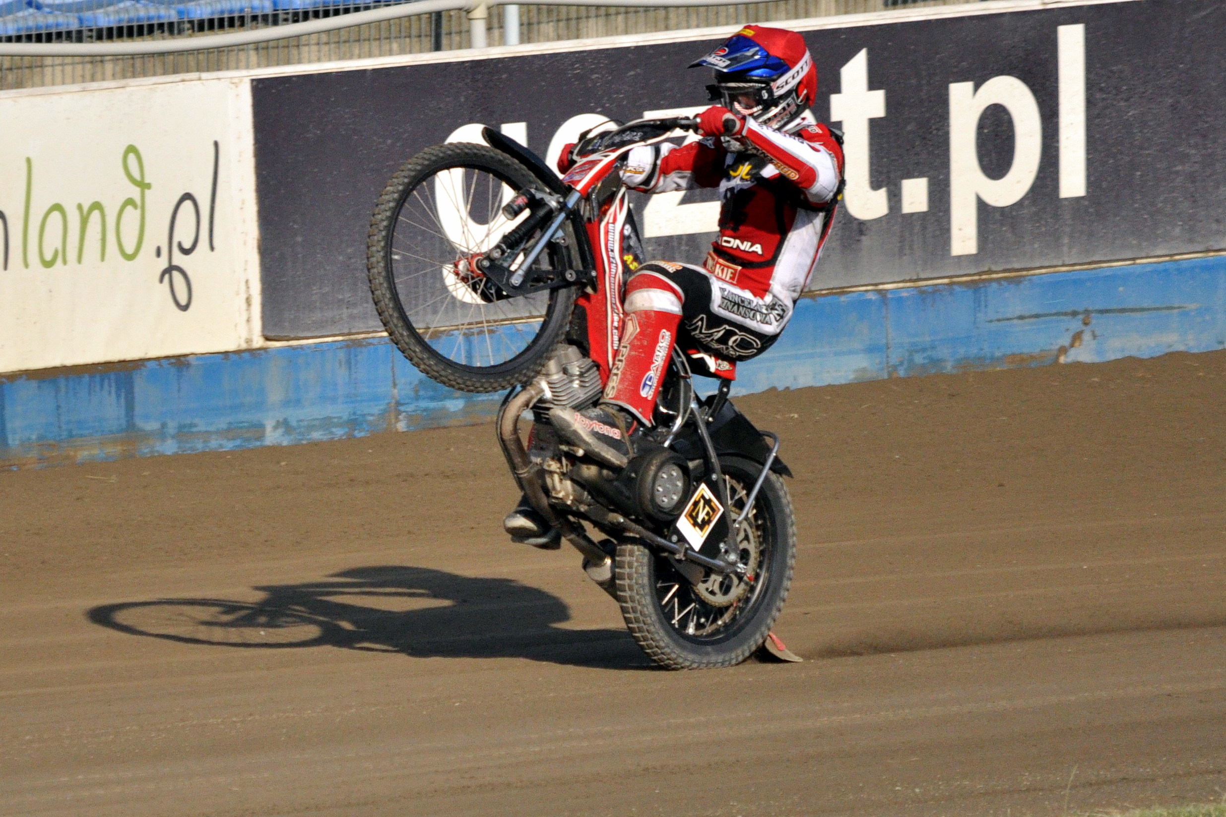 Szymon Woźniak (Polonia Bydgoszcz)robi świecę z radości po wygranym biegu ( III runda MDMP w Gorzowie Wlkp, 15. 07. 2014 r. )